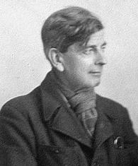 Zdeněk Matěj Kuděj (1881 - 1955), Český novinář, cestovatel, překladatel a spisovatel.